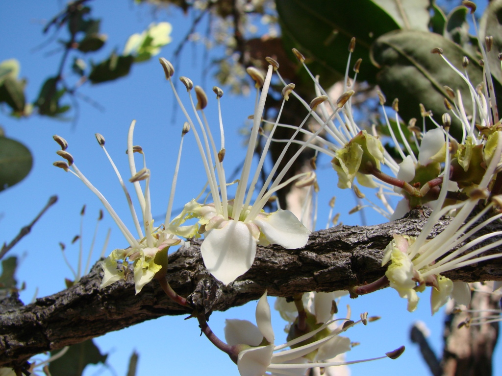 Mouriri pusa - MELASTOMATACEAE - Parque Estadual de Terra Ronca - São Domingos - GO - Brasil